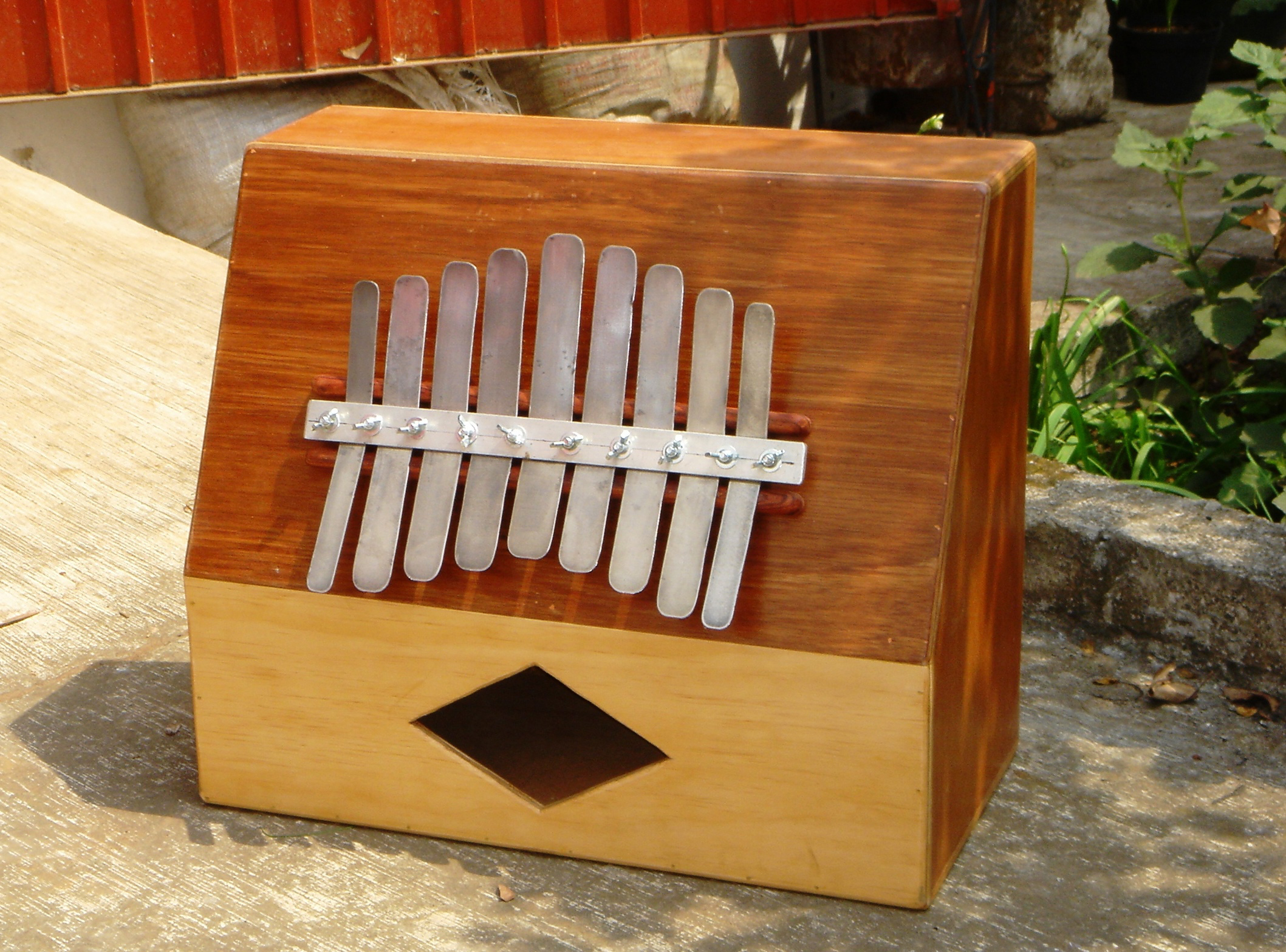 Marimbol jarocho fabricado por Diego Corvalán Vuskovic en el año 2005.